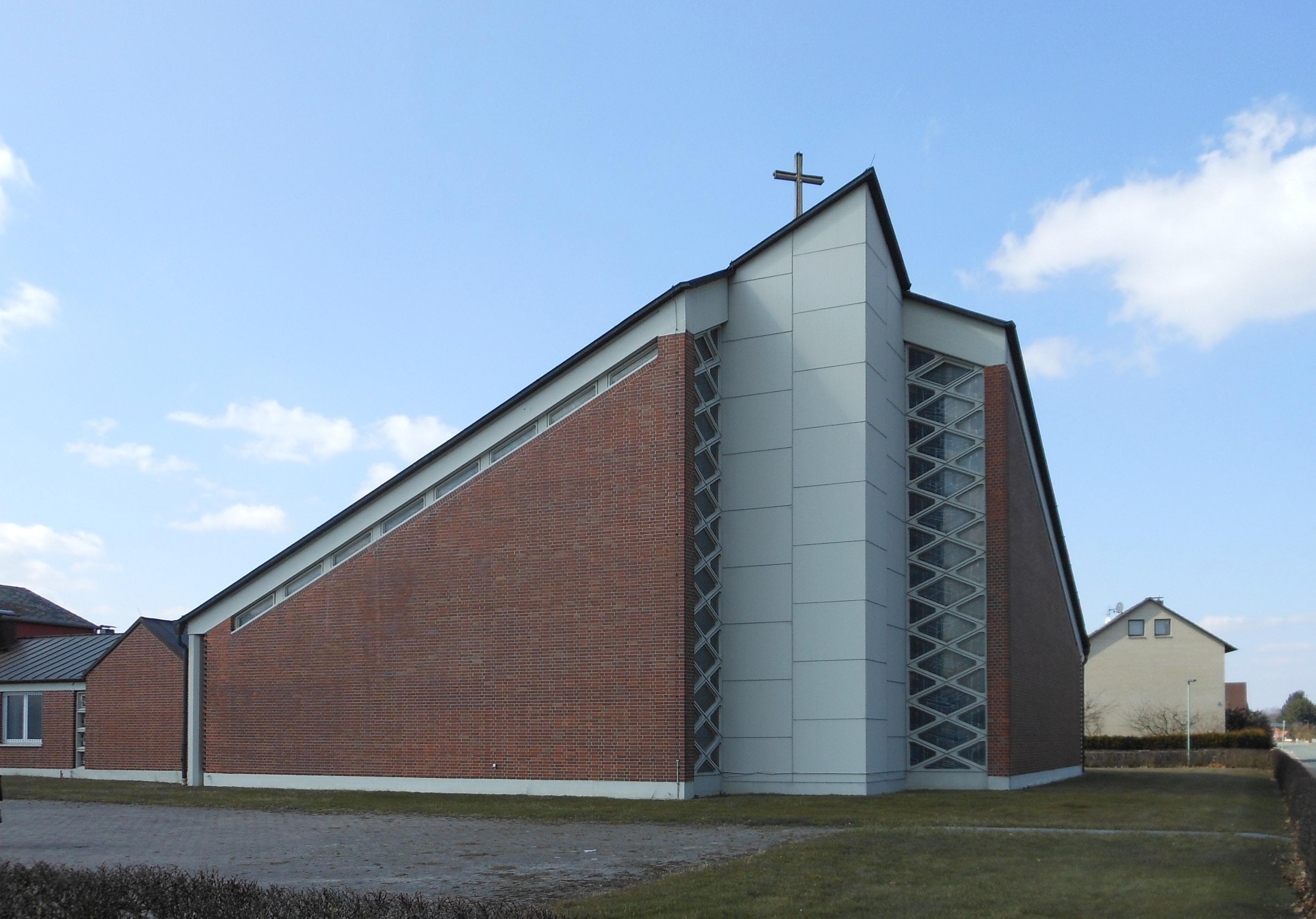 Hohnhorst-Scheller, kath. Kirche St. Petrus Canisius